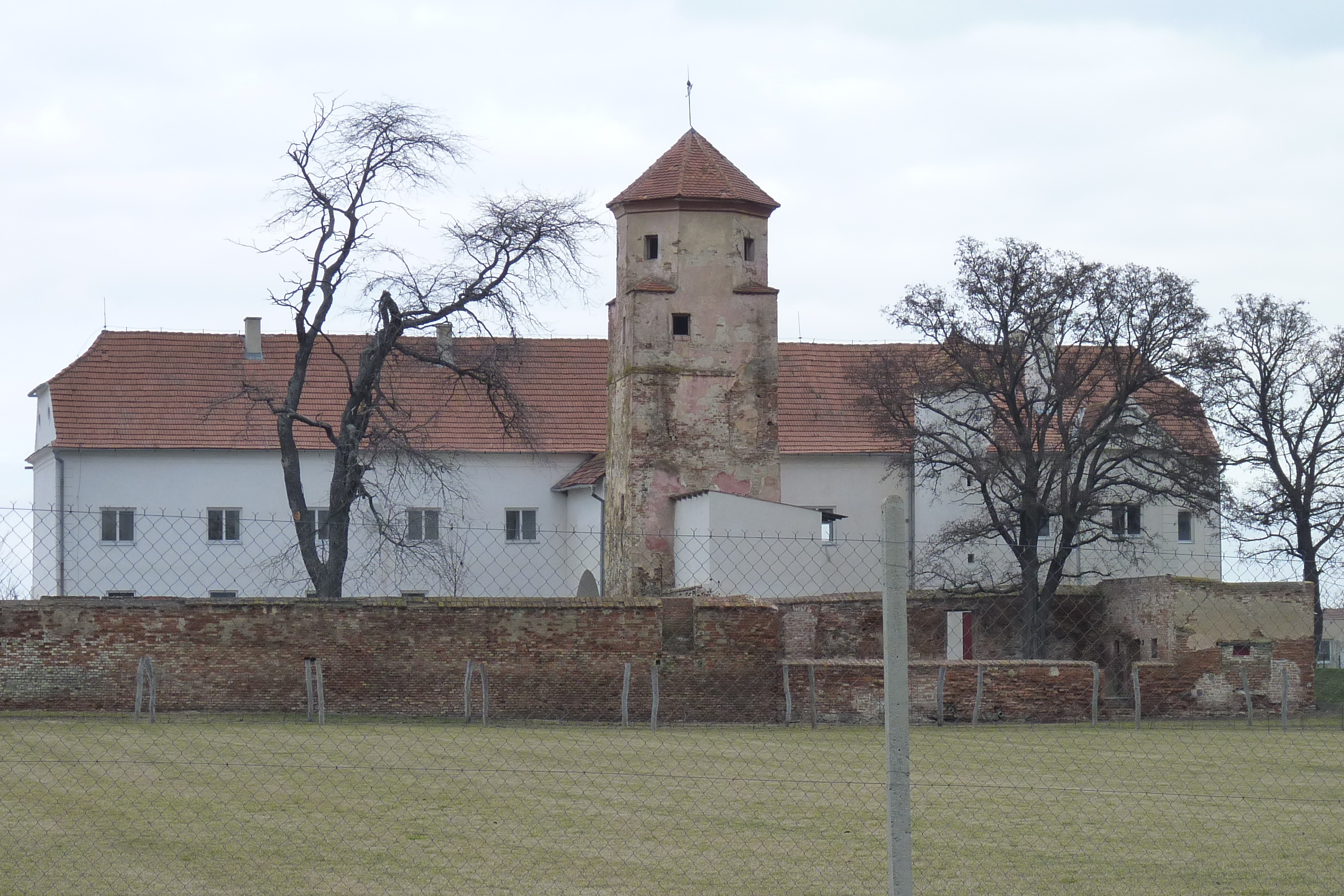 Zámek Vlasatice, Vlasatice